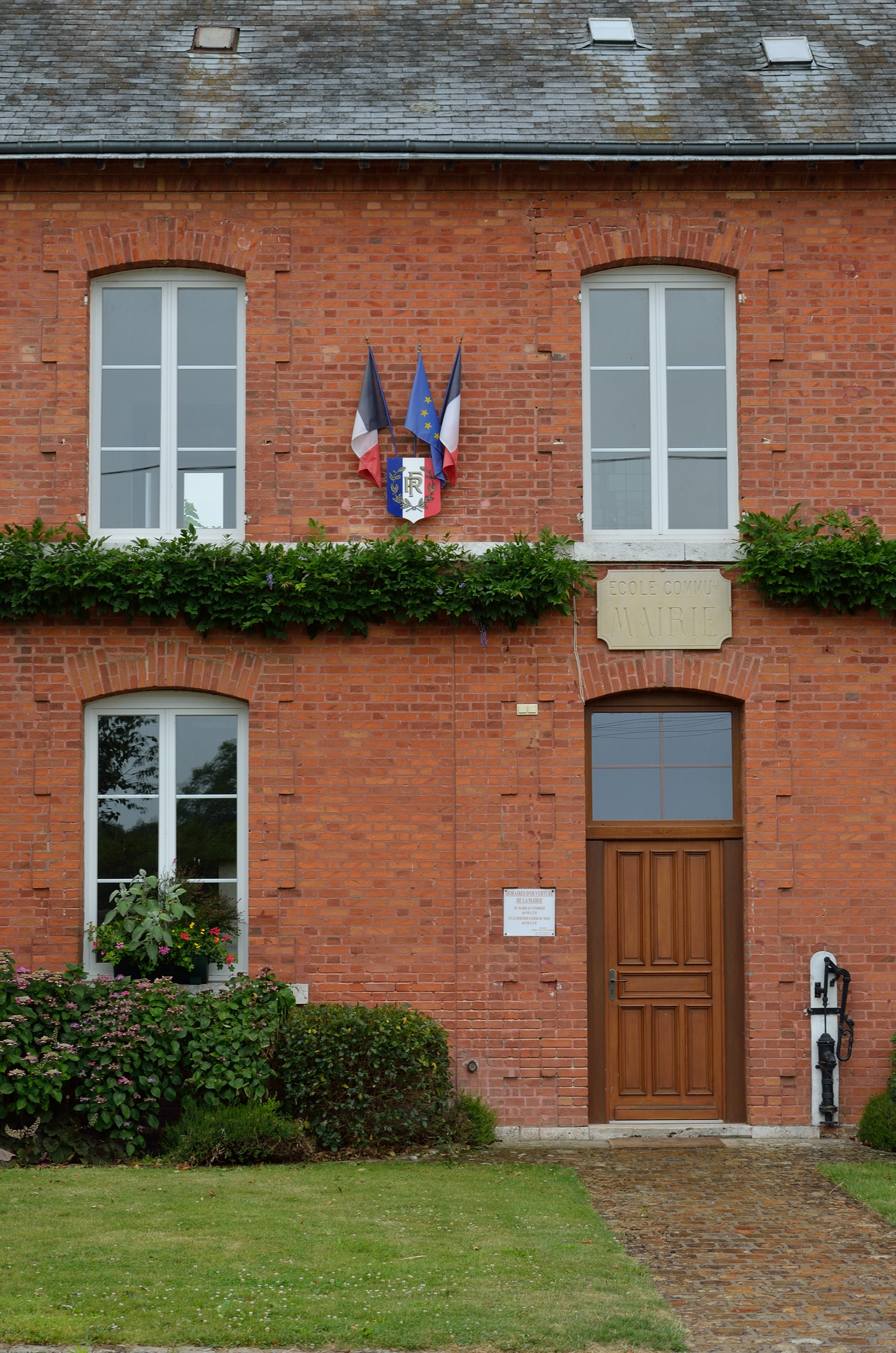 Façade de la mairie d'Ivoy-le-Marron (Loir-et-Cher)